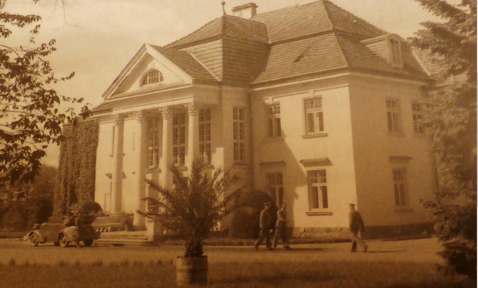 Inczew 1940 Niemiecki właściciel